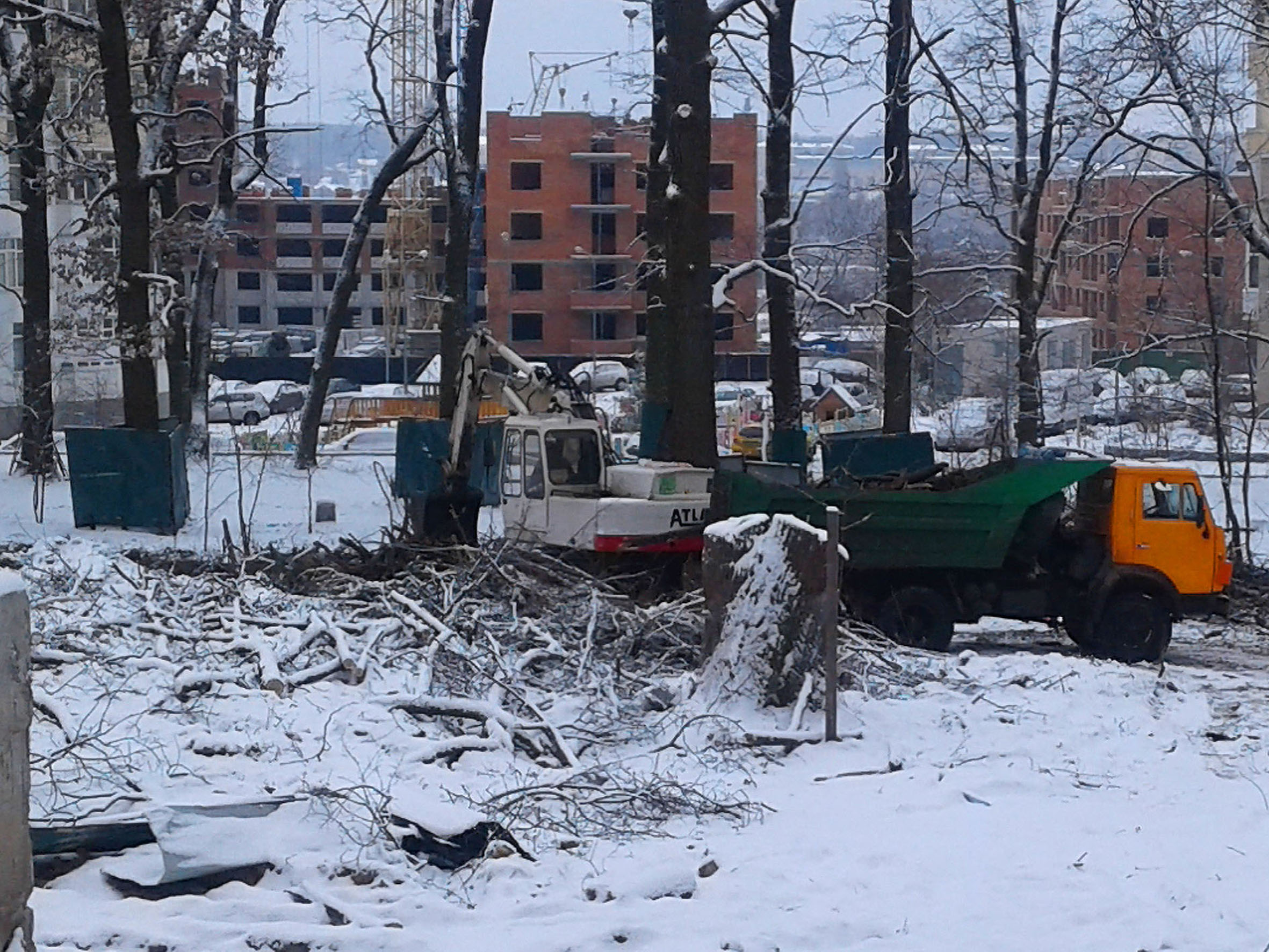 Вирубка дерев. Урочище Пилипів Потік. Ірпінь.